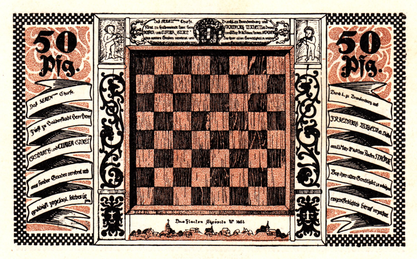 Notgeld, Stroebeck, 50 Pfennig, 1921, emergency money